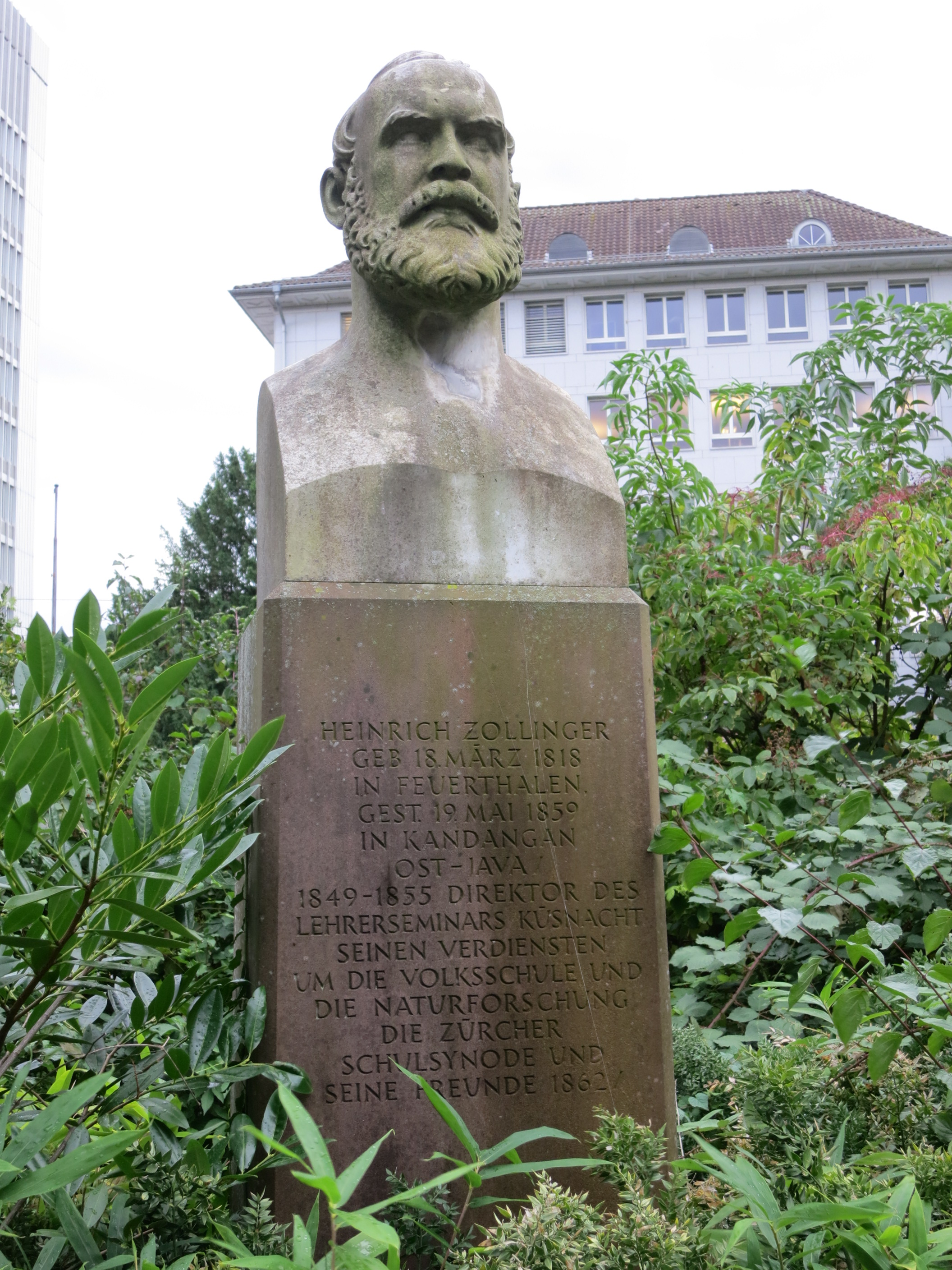 Heinrich Zollinger, alter botanischer Garten, Zürich, Schweiz